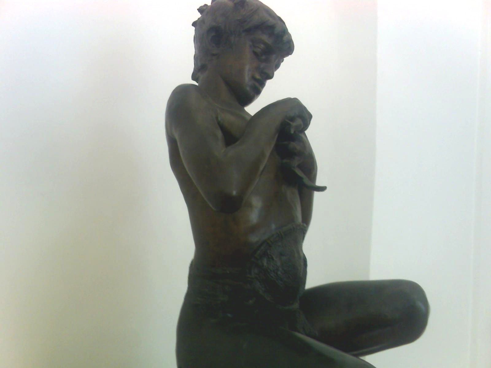 Accademia di Belle Arti di Napoli - La galleria dell'accademia, Vincenzo Gemito Pescatoriello (bronzo 1935)